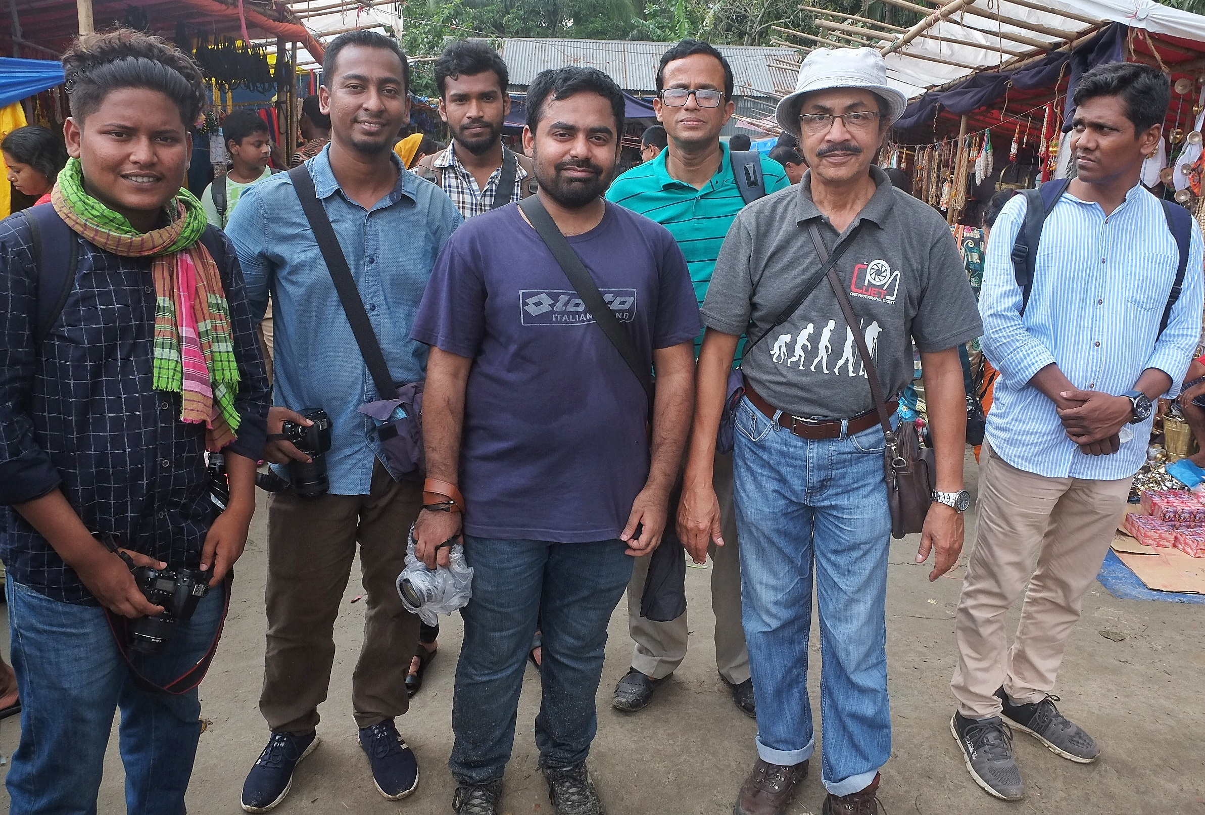 ছাত্রদের সাথে হাসান সাইফুদ্দিন চন্দন